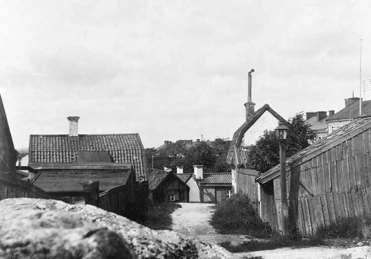 BARNÄNGEN MINDRE 12, F.d. Bergsprängargränd 20, F.d. Bergsprängargränd 18, Vita Bergen (Vitabergsparken), Kvarteret Vita Berget